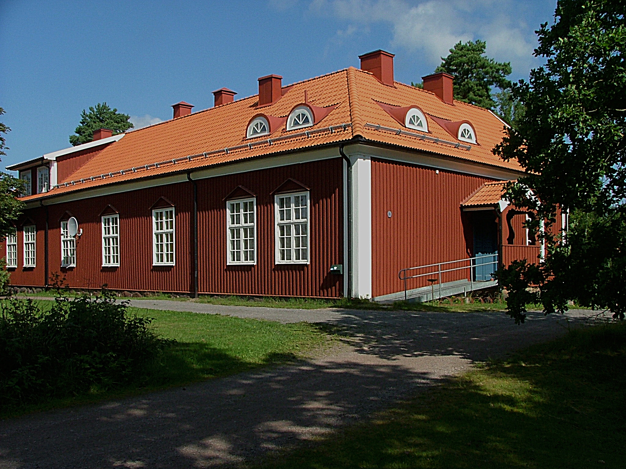 IOGT-NTO Gården från sydost. Huvudentré